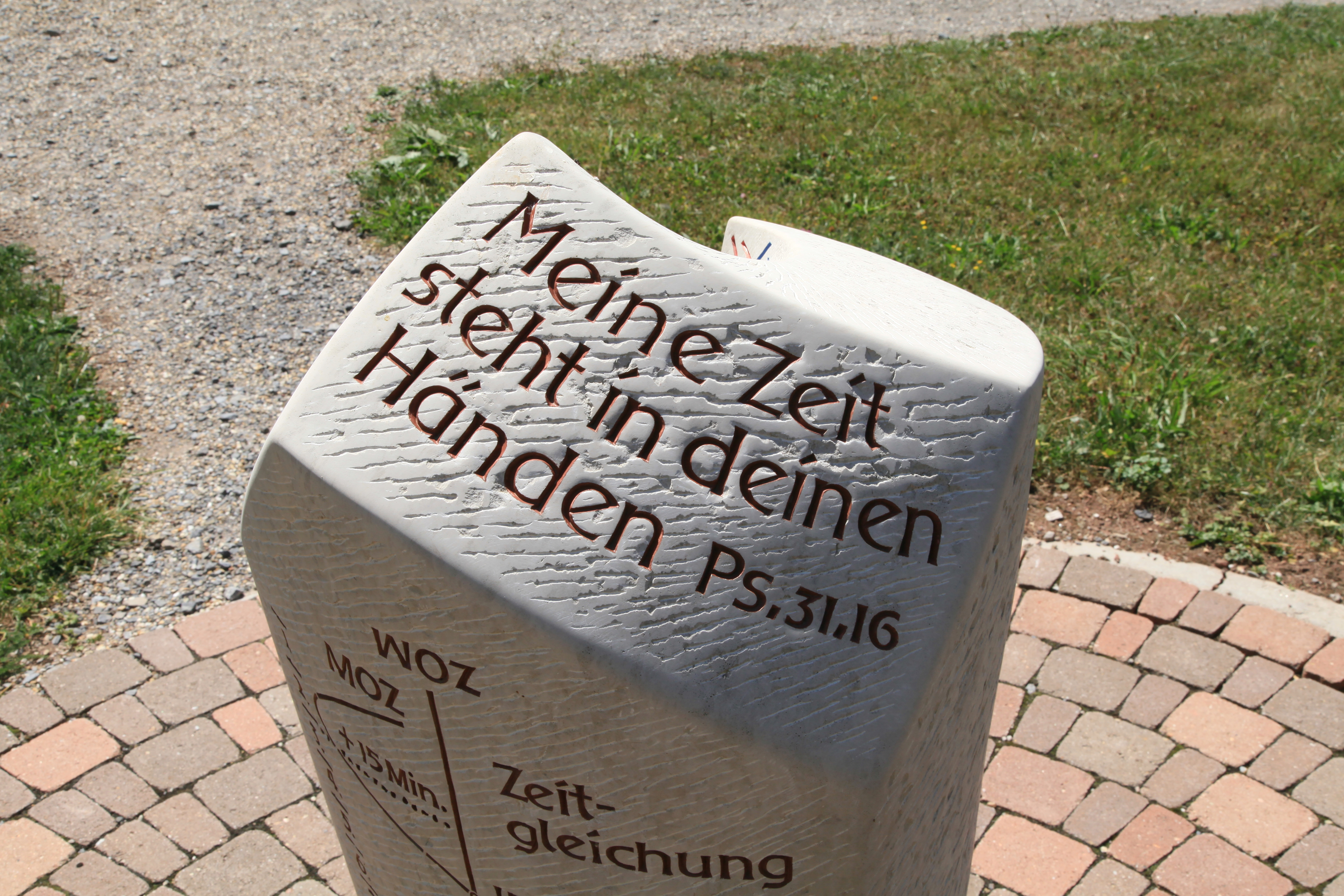 Sonnenuhr im Kurpark, Schwarzwaldstraße in Schömberg (Landkreis Calw)